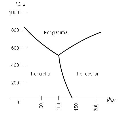 Les 3 phases de solidification du fer